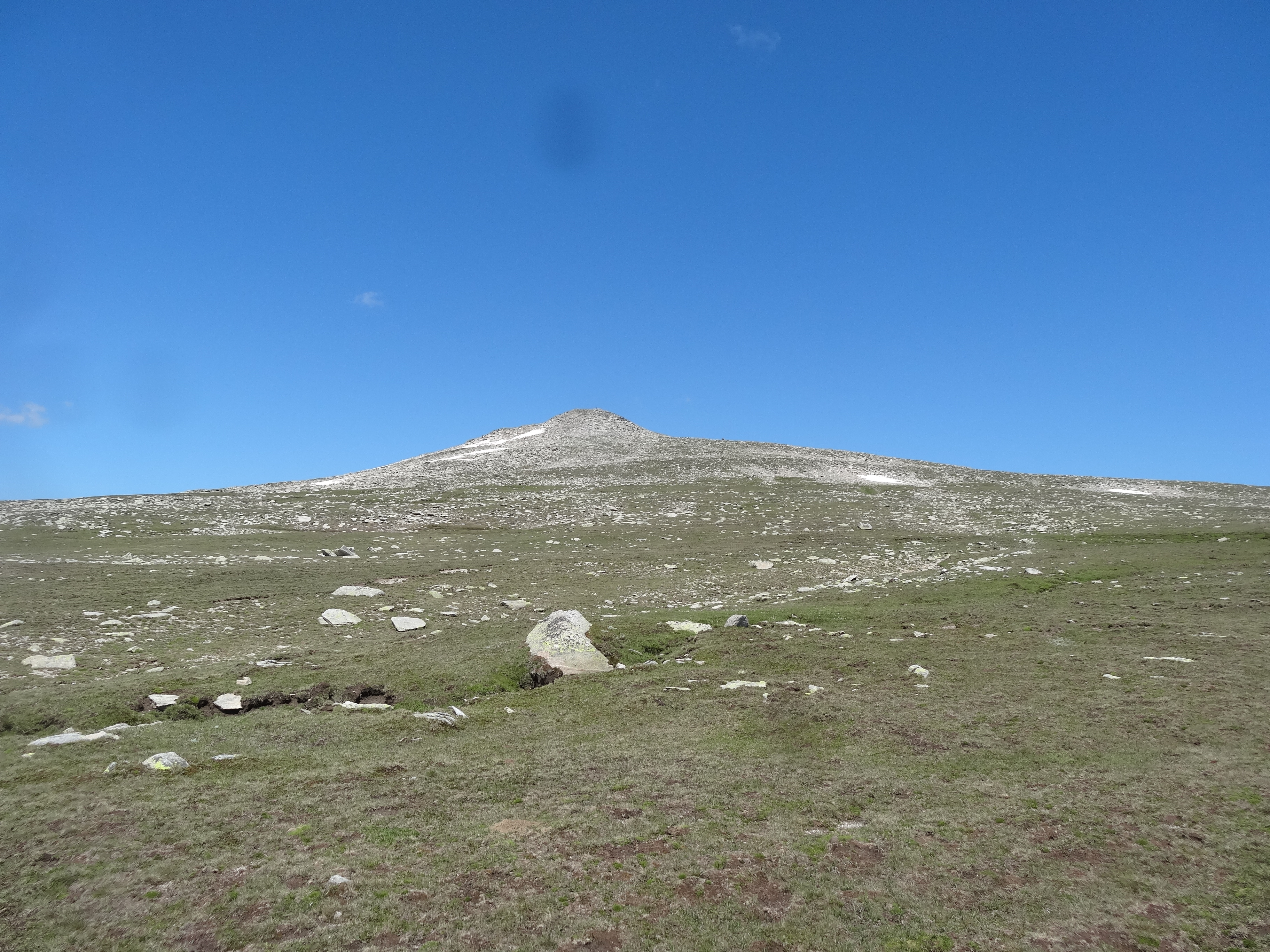 Puigpedrós des del sud (juliol 2013)